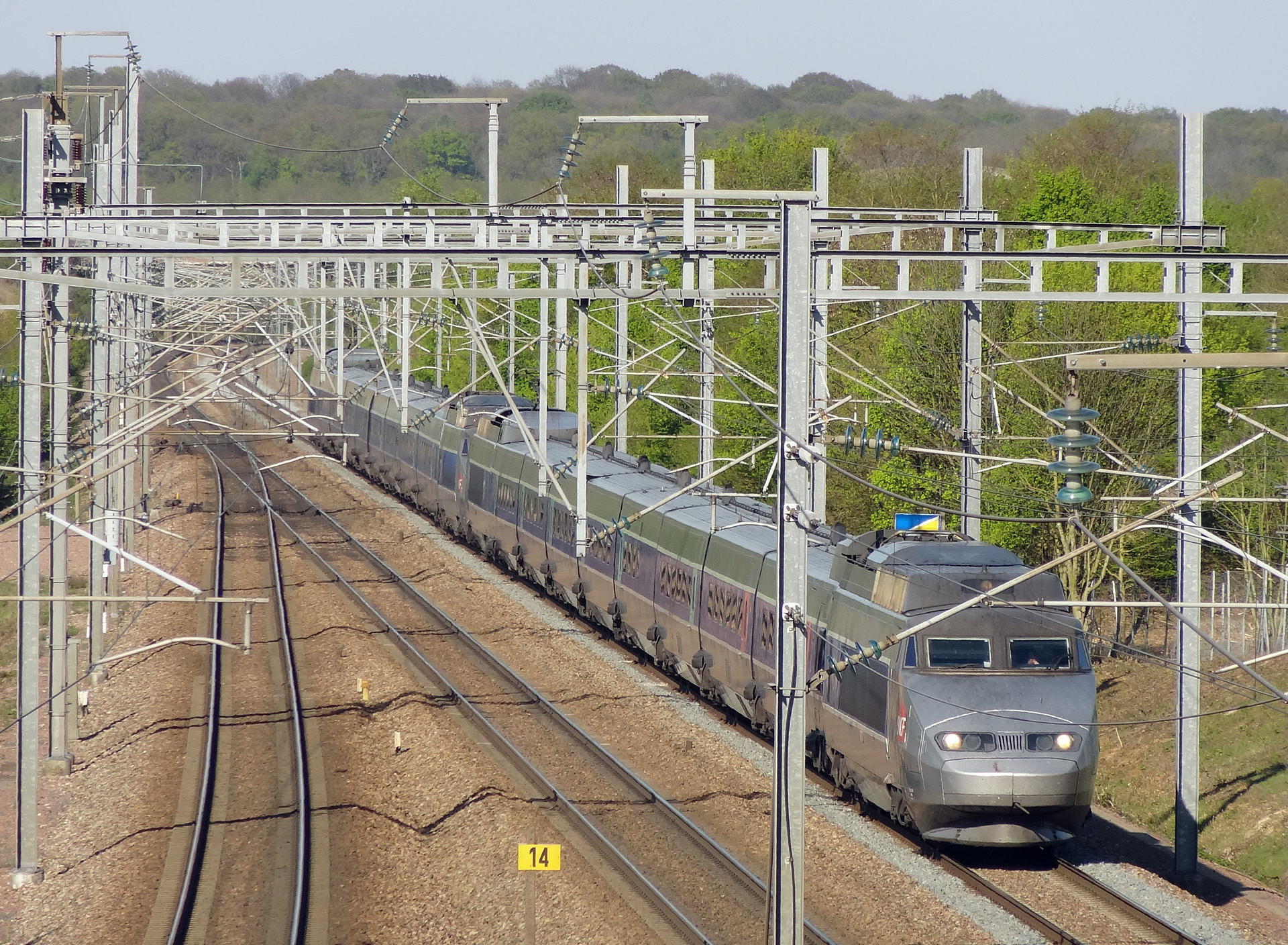 Une rame TGV Sud-Est sur la LGV Nord se dirige vers Paris-Nord, à hauteur du triangle de Vémars, à Moussy-le-Neuf (Seine-et-Marne), France.